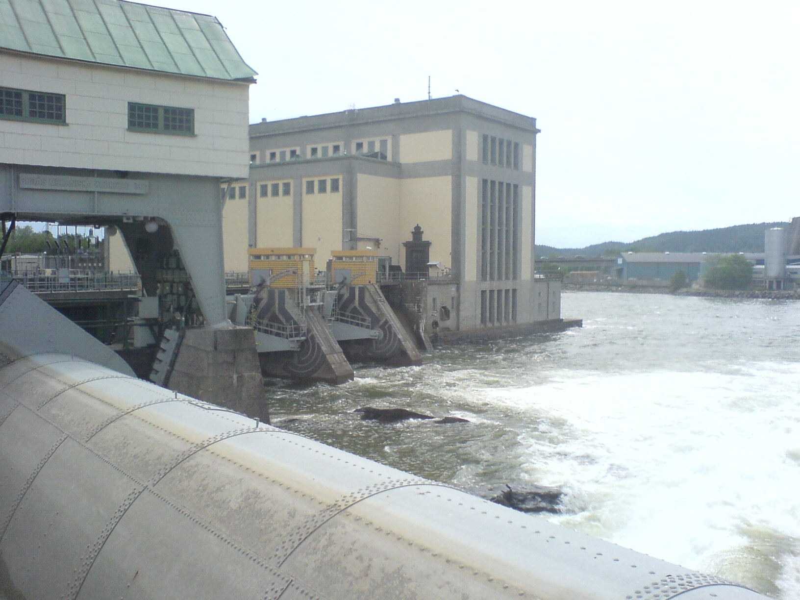 Taget med mobilkamera när jag sommarjobbade på vattenfall. Ska försöka fixa en vy från nedströms också.